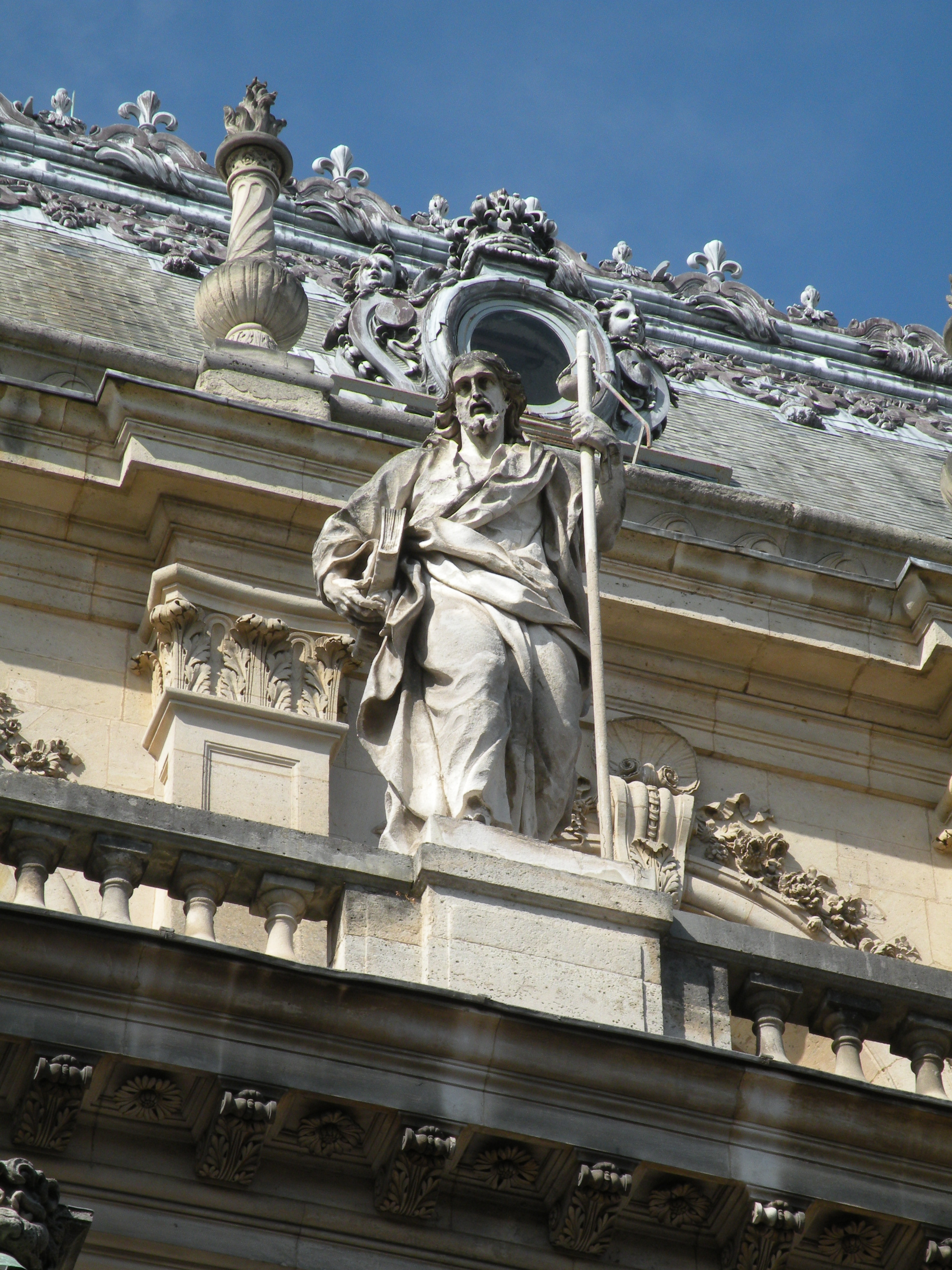 Statue de saint Jacques sur le toit de la chapelle royale du Château de Versailles.